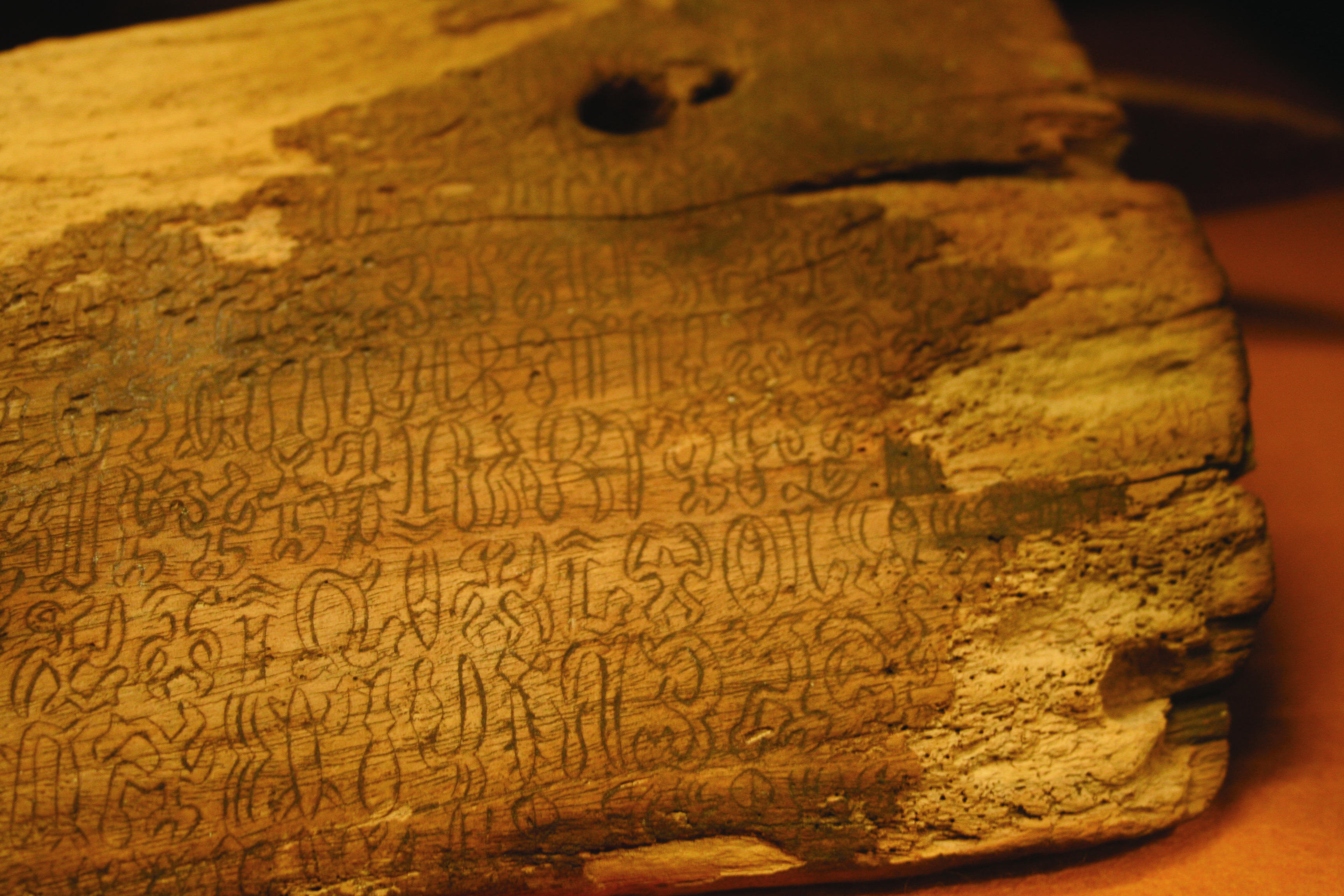 Rongorongo tablet